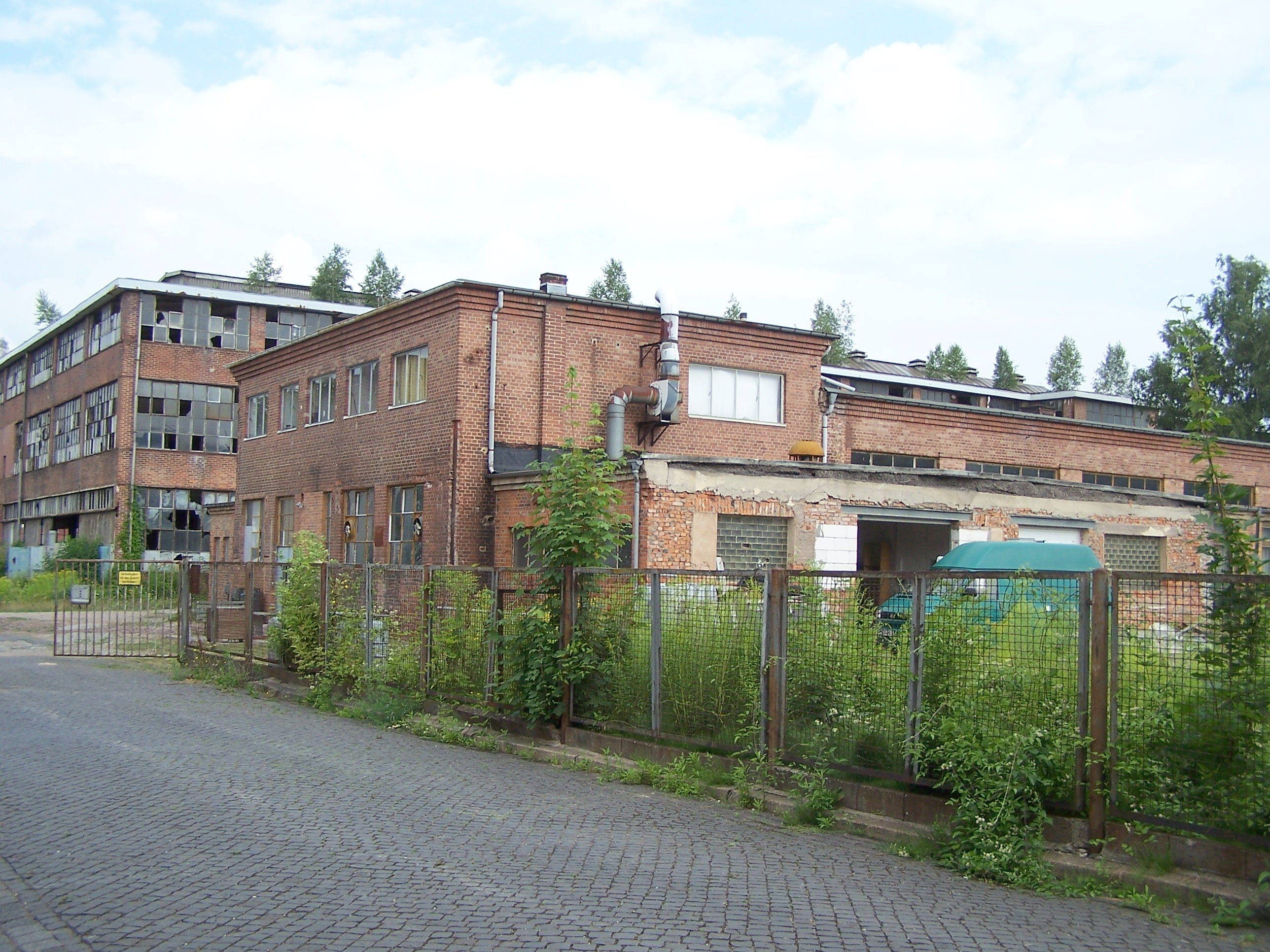 AWE Werksgelände, Südansicht des Gebäudes O5 - auch als Ostkantine bekannt.